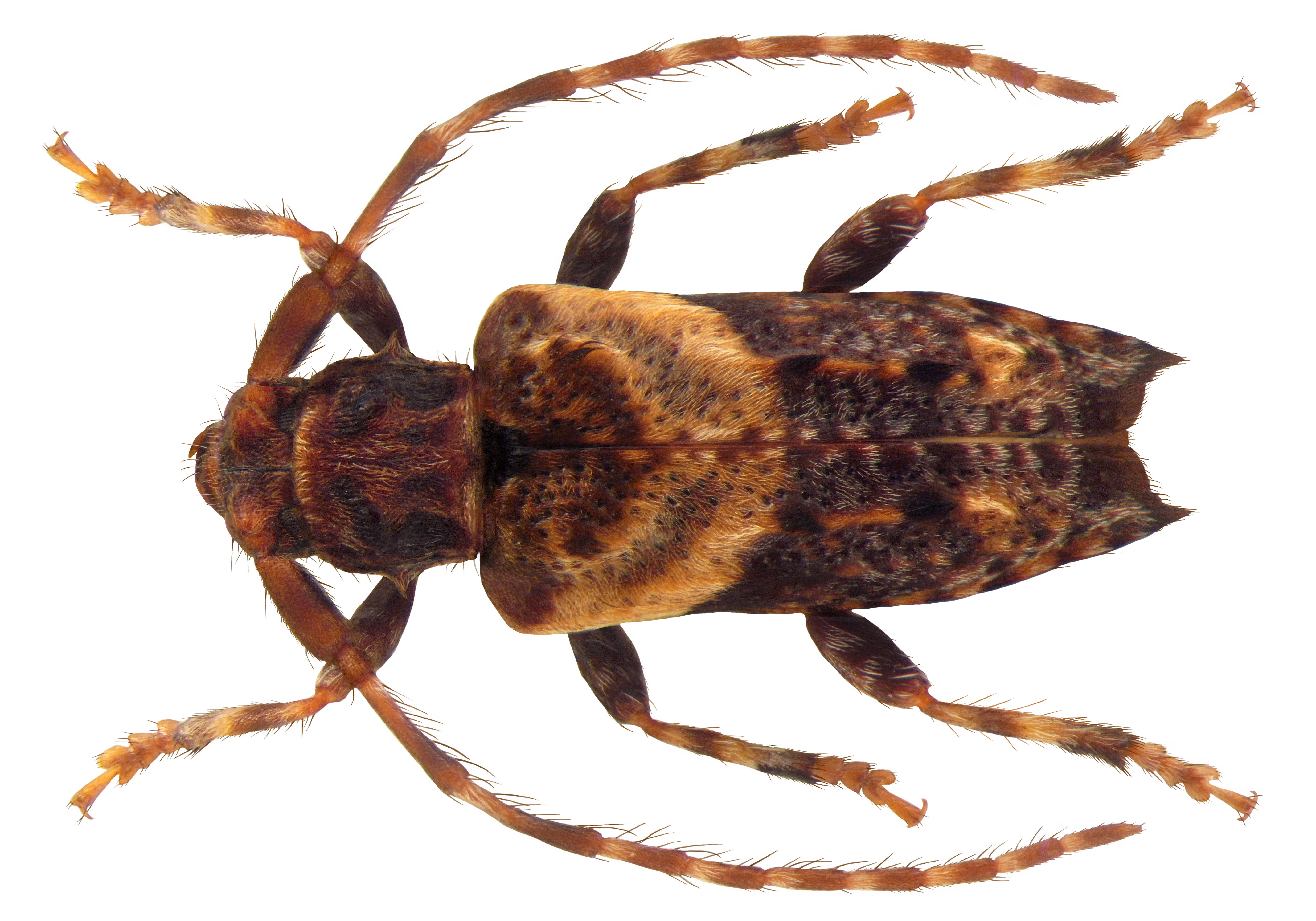 Familie: Cerambycidae Groesse: 4-6 mm Verbreitung: Europa Oekologie: Entwicklung in Zweigen von Laubbäumen Fundort: Germania, Bayern, Oberfranken, Kulmbach leg.det. U.Schmidt, 1980 Photo: U.Schmidt, 2010